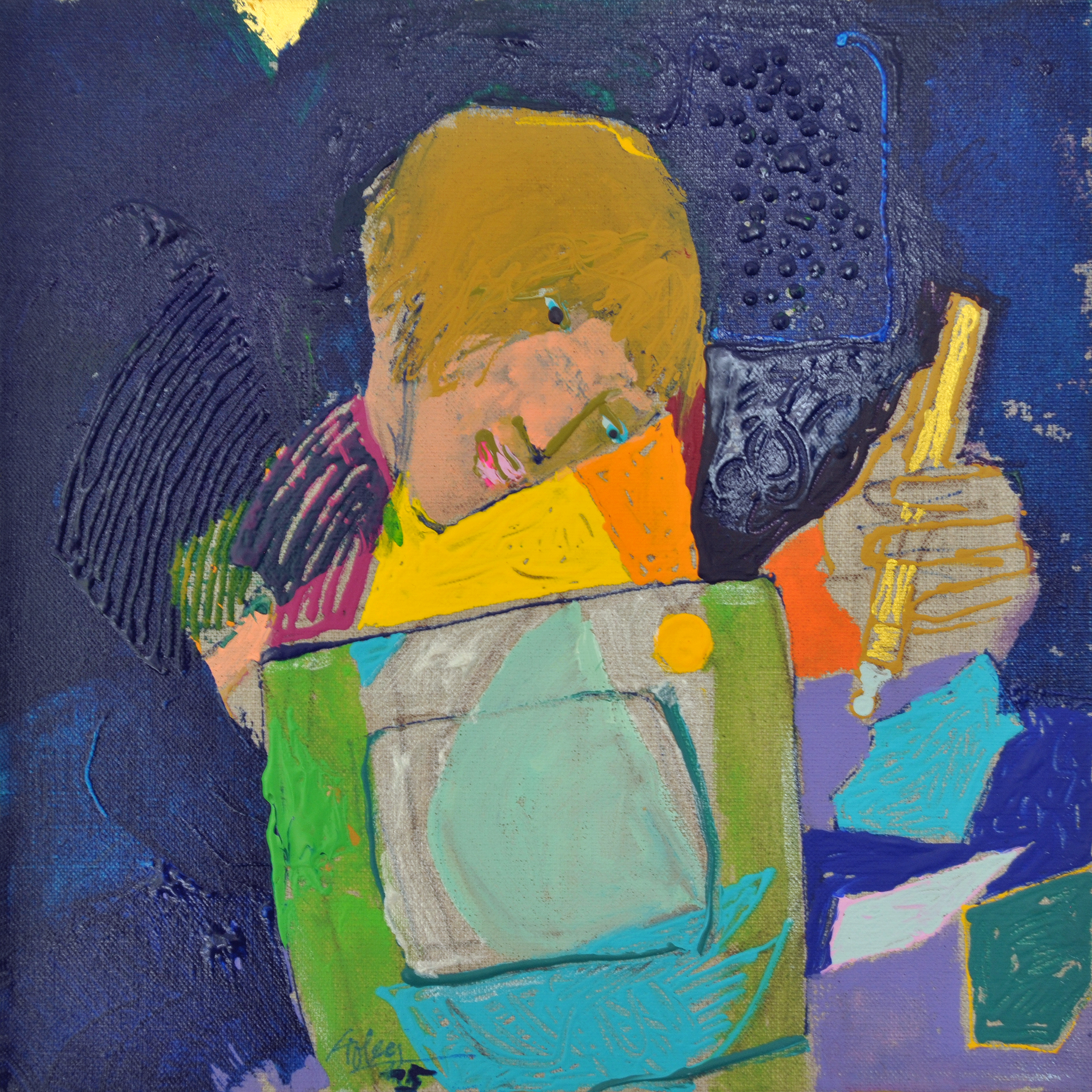 Adi Holzer malte dieses Gemälde im Jahr 2015 in Mischtechnik. Er gab dem Bild den Namen "Kim in Schlierbach". Seine Ehefrau nennt er Kim. Kim ist die Abkürzung ihres Namens "Kirsten Inger Mygind". Mit Schlierbach gibt Adi Holzer einen Hinweis auf die Glasmalerei-Werkstätte Schlierbach in dem Stift Schlierbach. Das Bild zeigt Kim bei der Glasmalerei eines farbigen Glastellers im Stift Schlierbach in Österreich. Im Vordergrund zeigt das Bild die Aufsicht auf den bemalten Glasteller mit der Hand von Kim. Das gelbe Dreieck am oberen Bildrand gibt einen Hinweis auf die Anwesenheit des dreieinigen Gottes als Gott Vater, Gott Sohn (Jesus Christus) und Heiliger Geist.